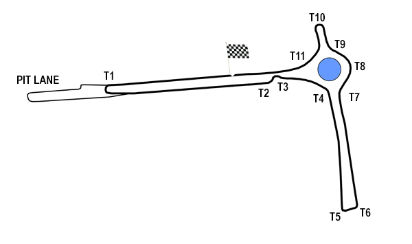 Rennstrecke Karl-Marx-Allee, 2.030 km, 11 Kurven